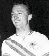 Podium de poursuite cycliste individuelle aux JO de Melbourne, 1er Michel Rousseau (Fr), 2e G. Pesenti (It), 3e R. Ploog (Aus).